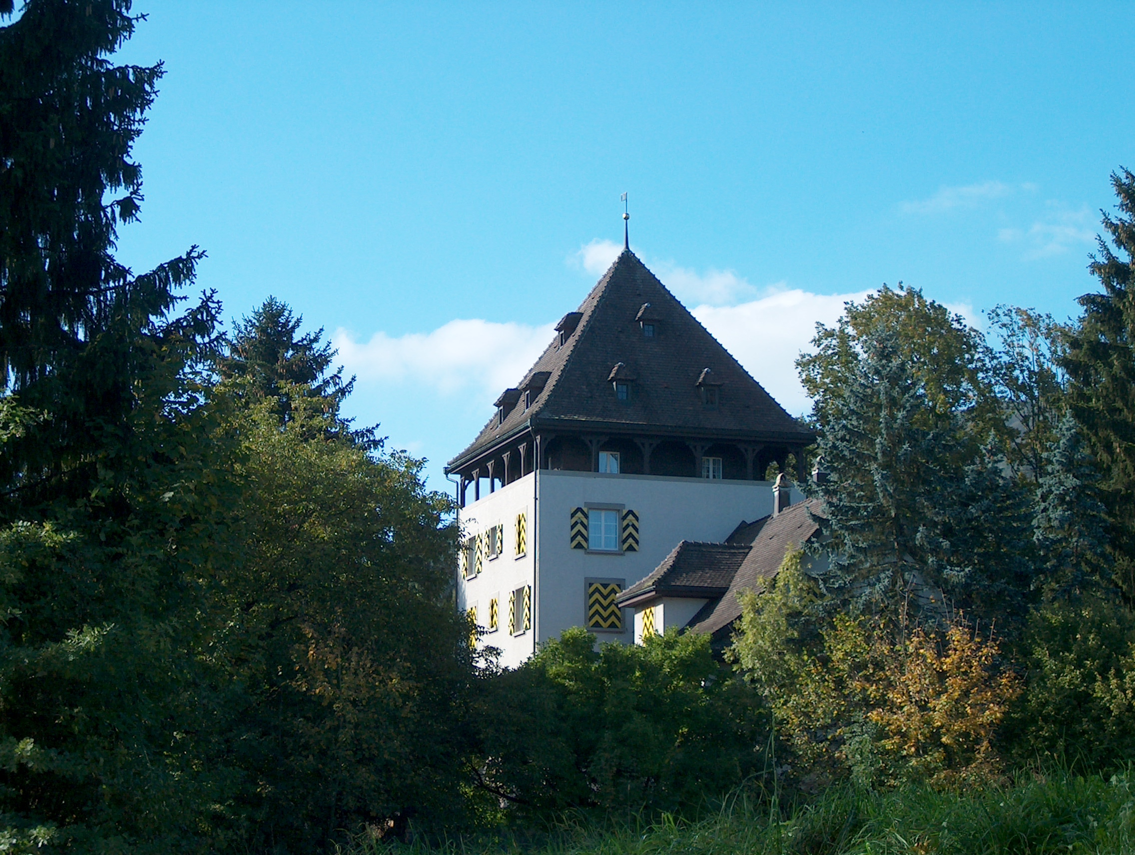 Schloss Auenstein